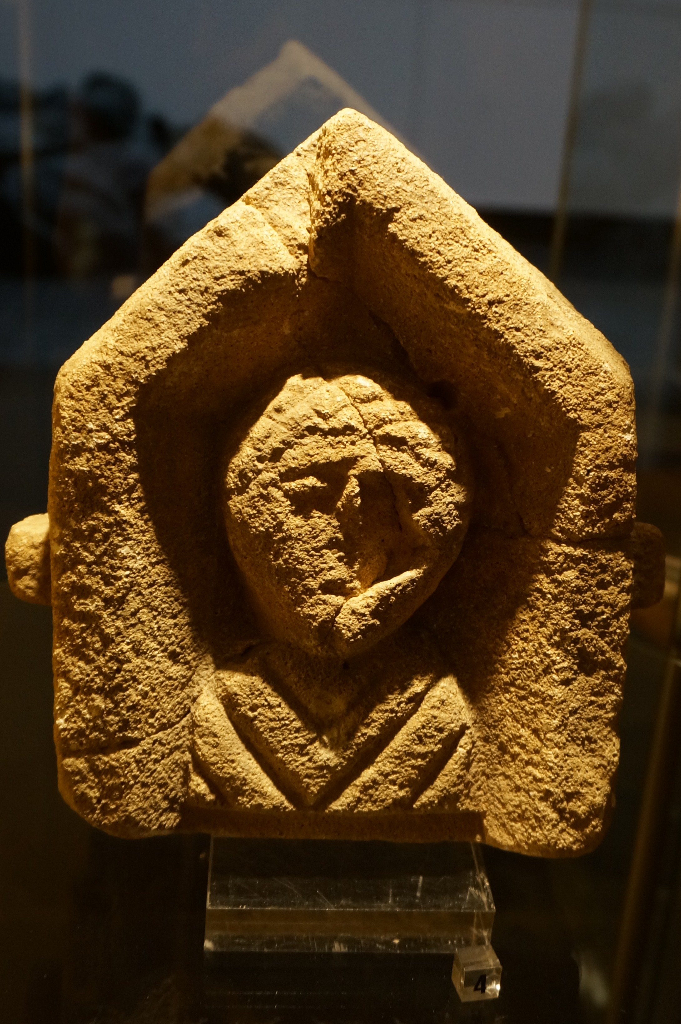 Buste , Acy Romance .